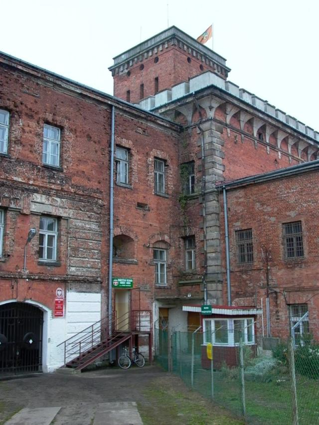 Fotografia przedstawia widok wieży zachodniej, zwanej Tatarską, Czerwoną bądź Kaukaską Twierdzy Modlin. Stan na jesień 2004 roku. Wykonał Zbigniew Strucki.